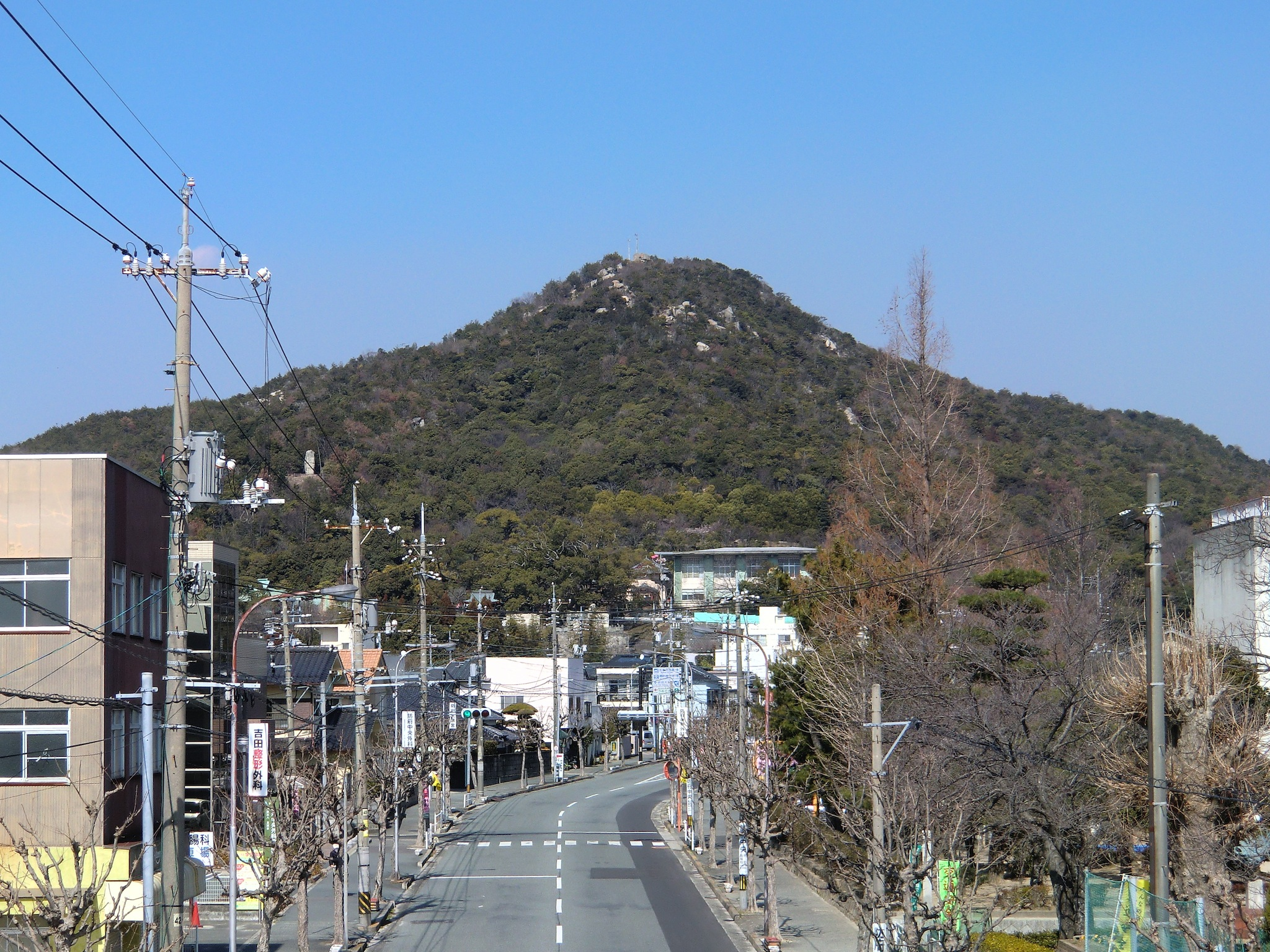 防府市天神山の遠景。